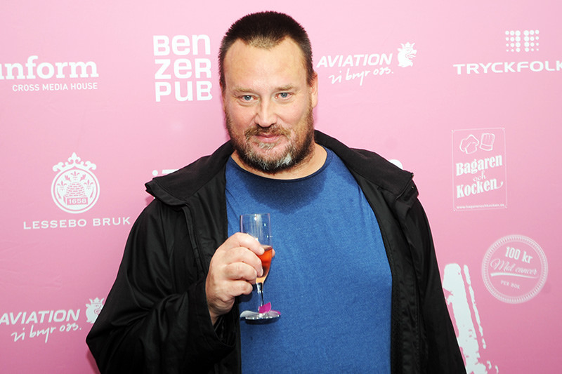 Erik Hörstadius